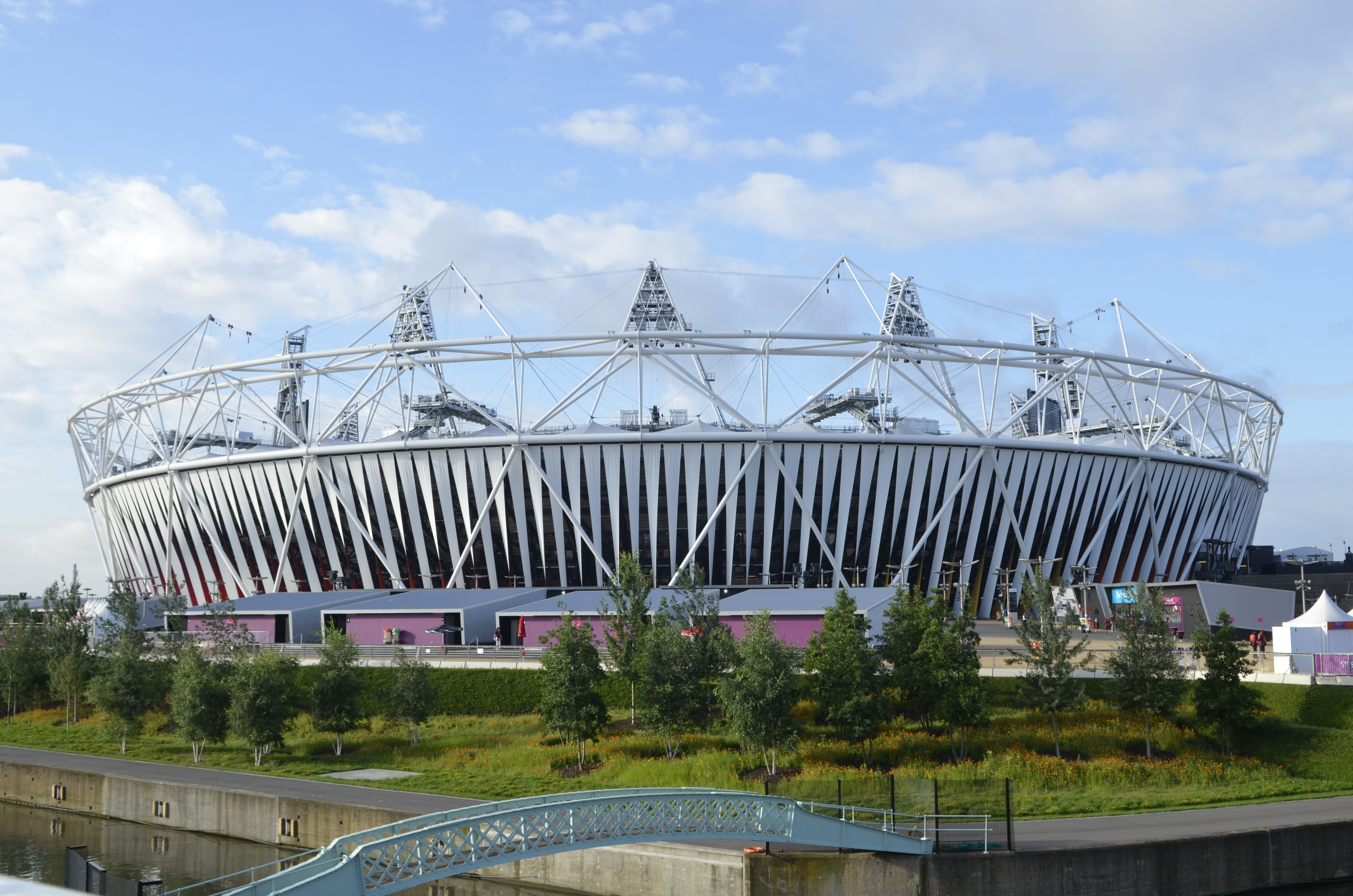 _D703184